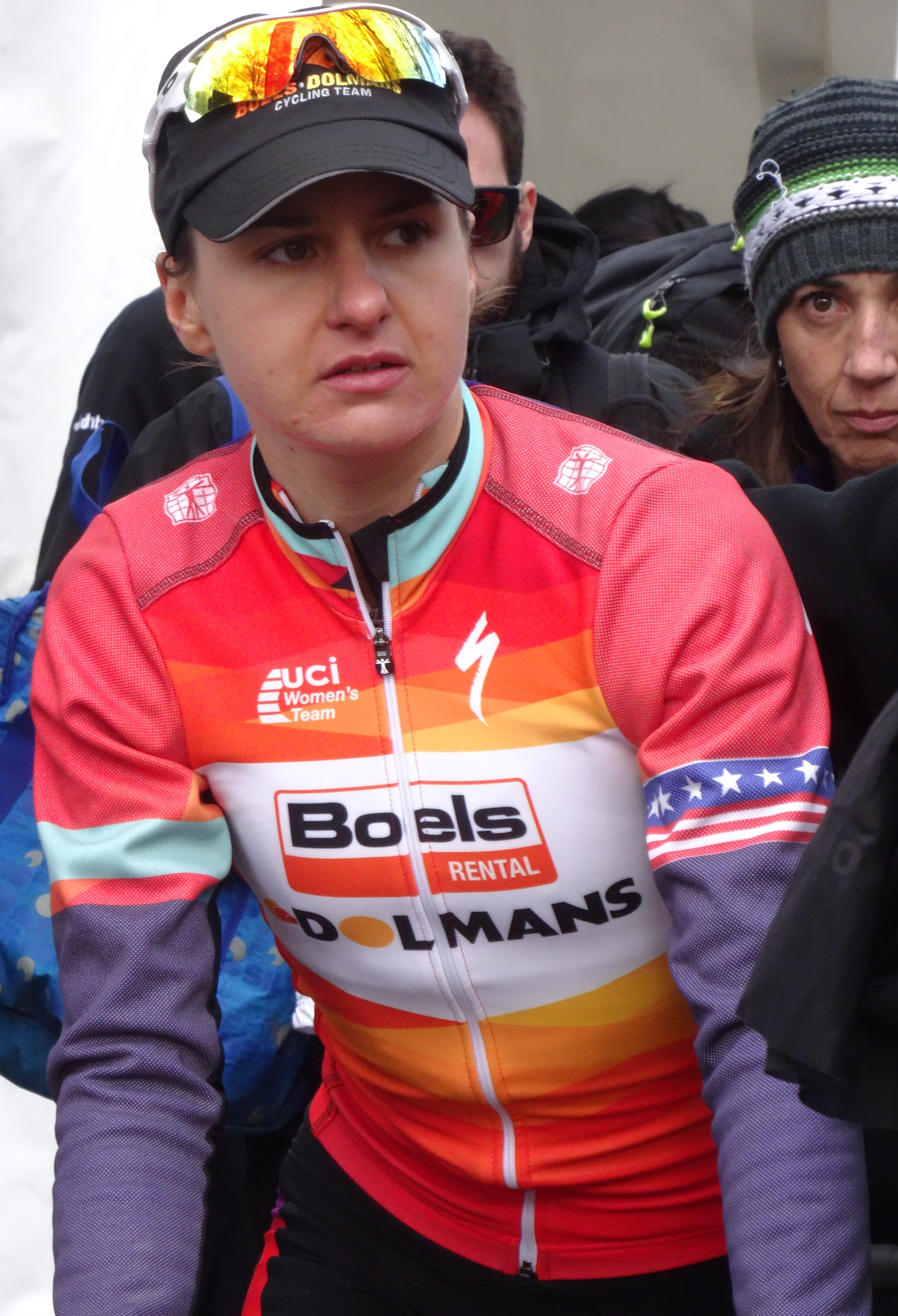 Reportage réalisé le mercredi 4 mars à l'occasion de l'arrivée du Samyn des Dames 2015 et du Samyn 2015 à Dour, Belgique.